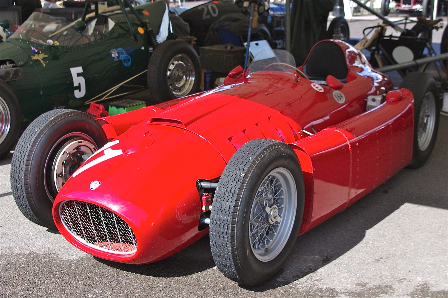 Goodwood Revival 2012